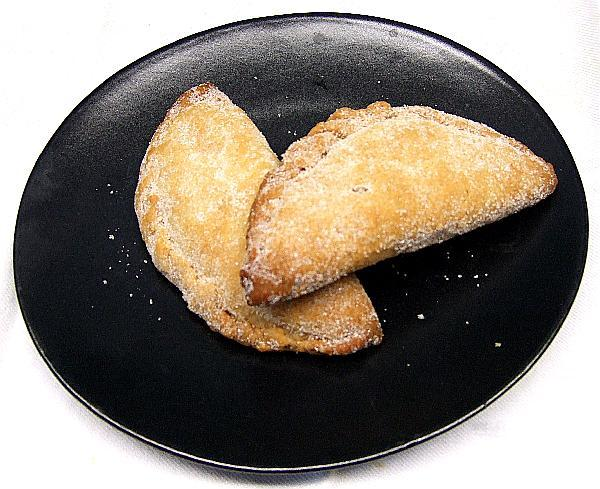 pastissets típics de les Terres de l'Ebre